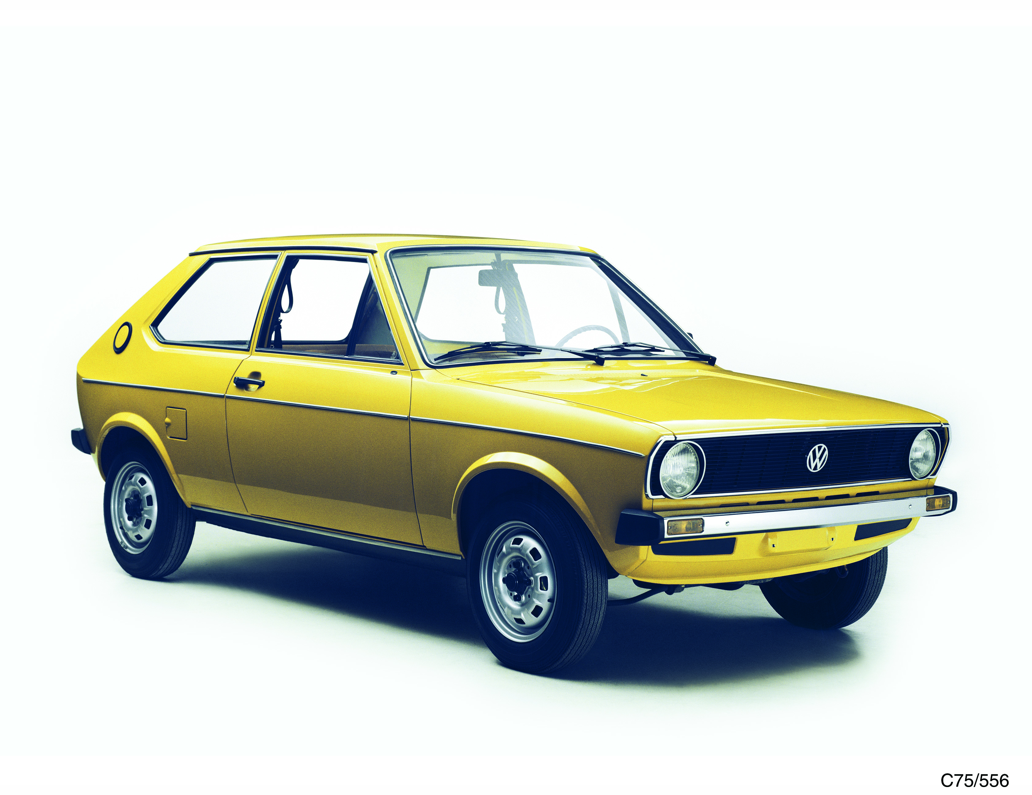 Volkswagen Polo I 1975-1981